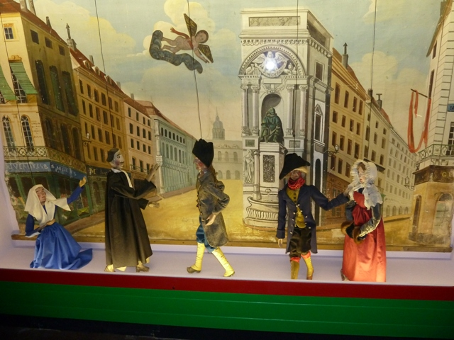 Collection de marionnettes